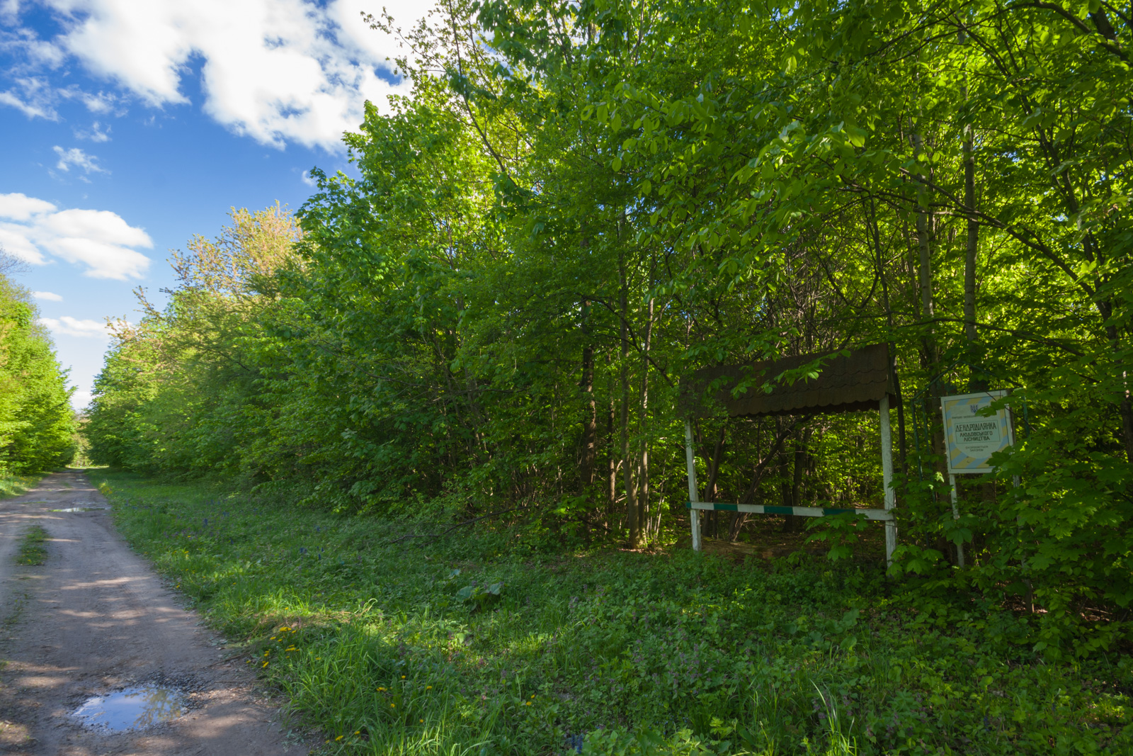 Дендрологічна ділянка, Жмеринський район, Людавська сільська рада, Людавське лісництво кв. 81 діл. 17